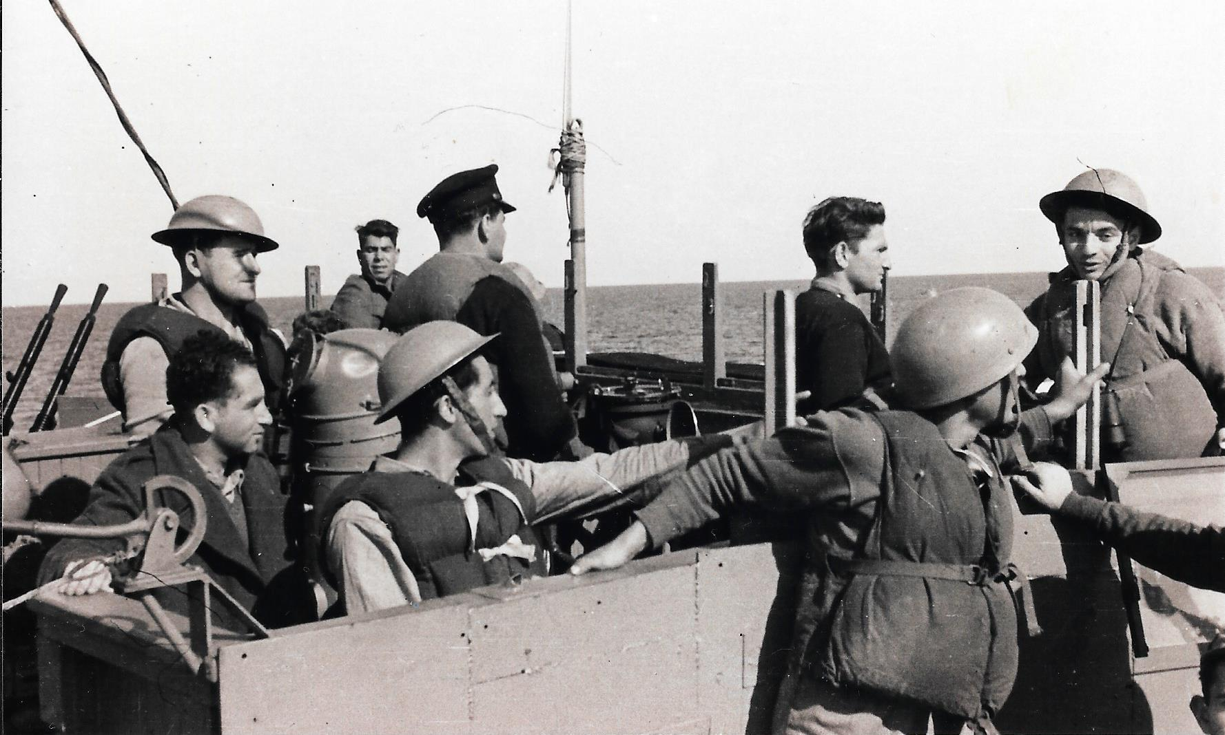 ינאי מפקד הפלי"ם מתאר לחיים וייצמן את הבאת ספינות המעפילים